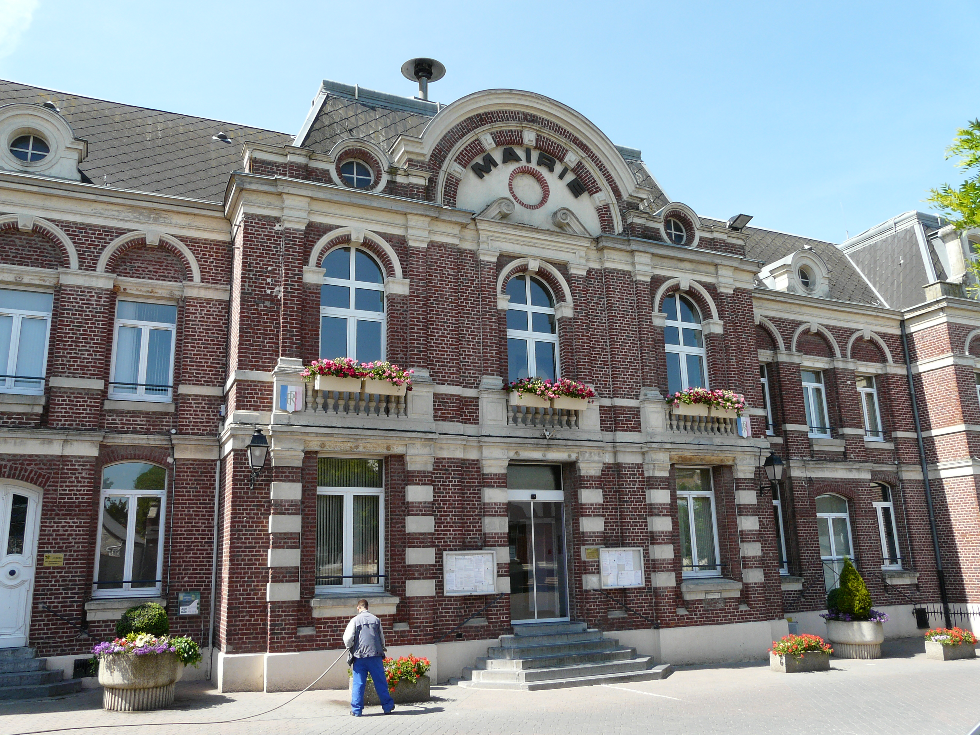 Maire d'Avesnes-les-Aubert (Nord, France)